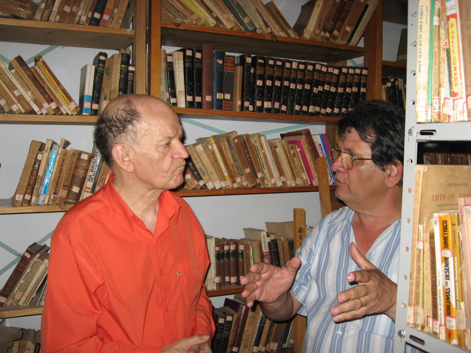 O professor Ático Vilas-Boas da Mota e Dário Cotrim.